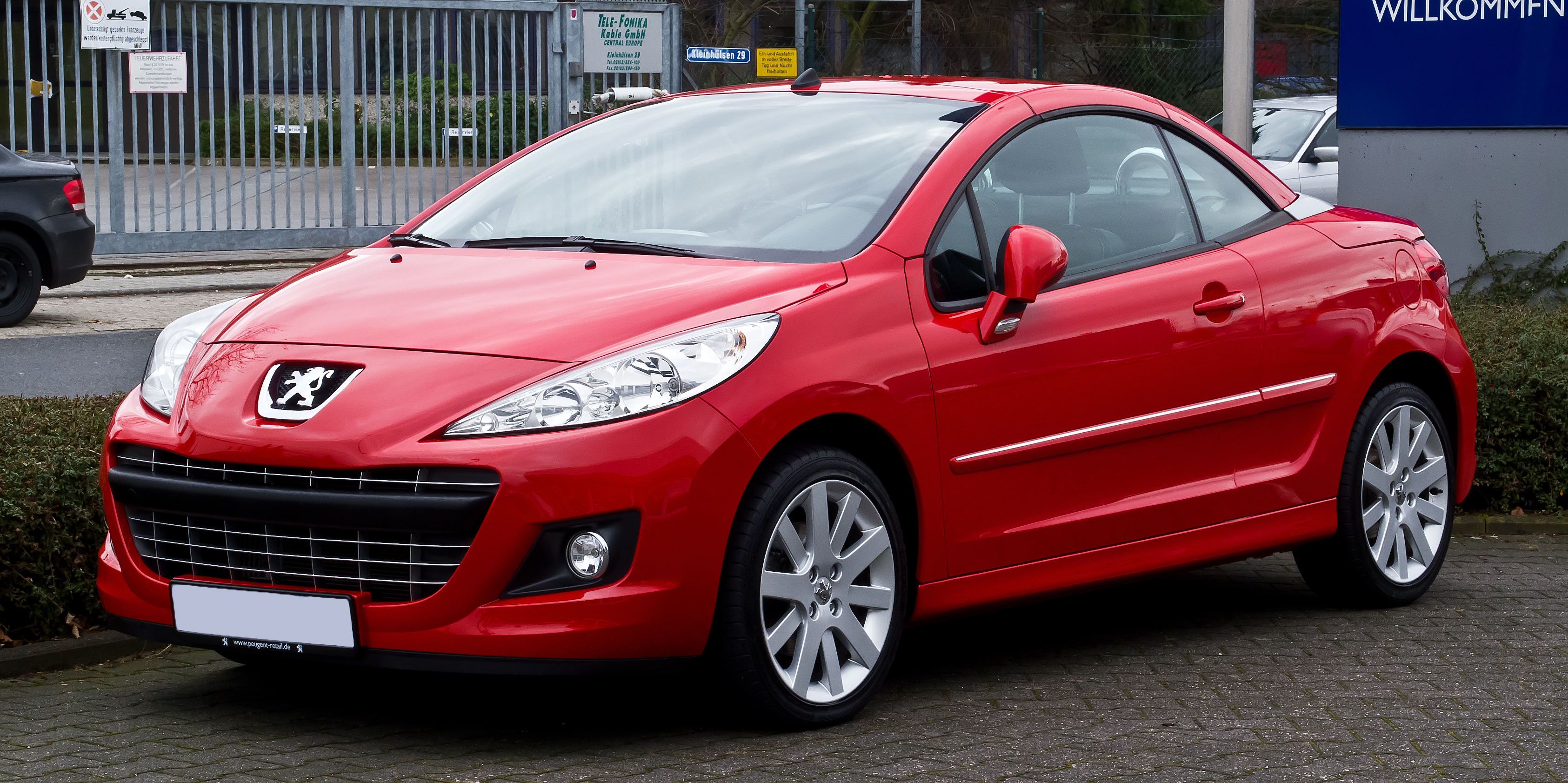 Peugeot 207 CC (Facelift)